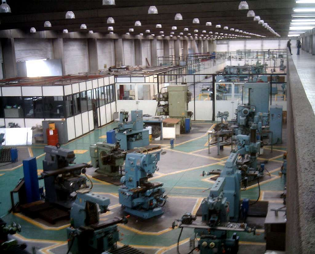 Vista parcial de las máquinas-herramienta de los laboratorios pesados de la UPIICSA, para la asignatura de Control Numérico (CNC) de la Ingeniería en Informática y la Ingeniería Industrial.